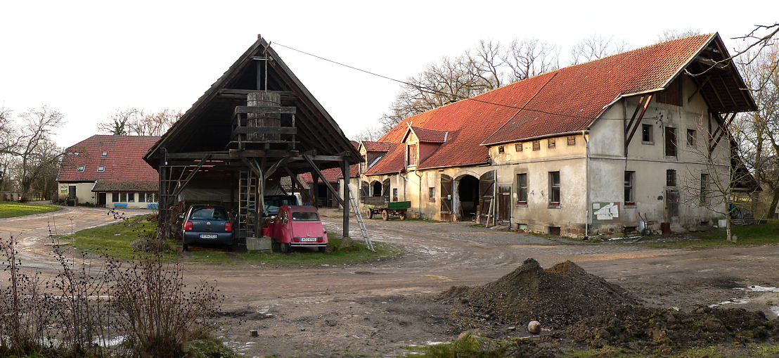 Adolphshof